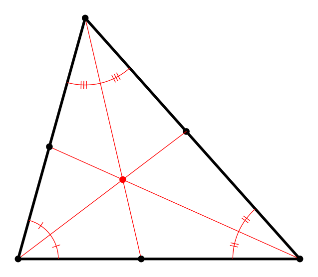 Bisektriser